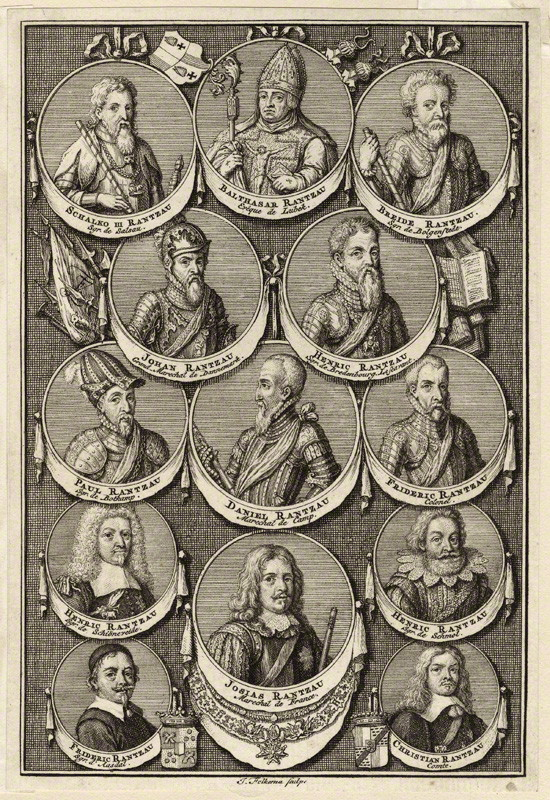 Johannes Jakosbz Folkema: Familie Rantzau; Balthasar Rantzau (1497-1547), Bishop of Lubeck. Breide Rantzau (1563-1639), Member of the Rantzau family. Christian Rantzau (1614-1663), Member of the Rantzau family. Daniel Rantzau (1529-1569), German-Danish General. Frideric Rantzau, Member of the Rantzau family. Frideric Rantzau, Member of the Rantzau family.. Heinrich Rantzau (1526-1598), German humanist writer and statesman. Heinrich Rantzau der Jüngere (1599-1674), Member of the Rantzau family. Henric Rantzau. Johan Rantzau (1492-1565), German-Danish General and statesman. Josias Rantzau (1609-1650), German soldier. Paul Rantzau, Member of the Rantzau family. . Schalko Rantzau III, Member of the Rantzau family.